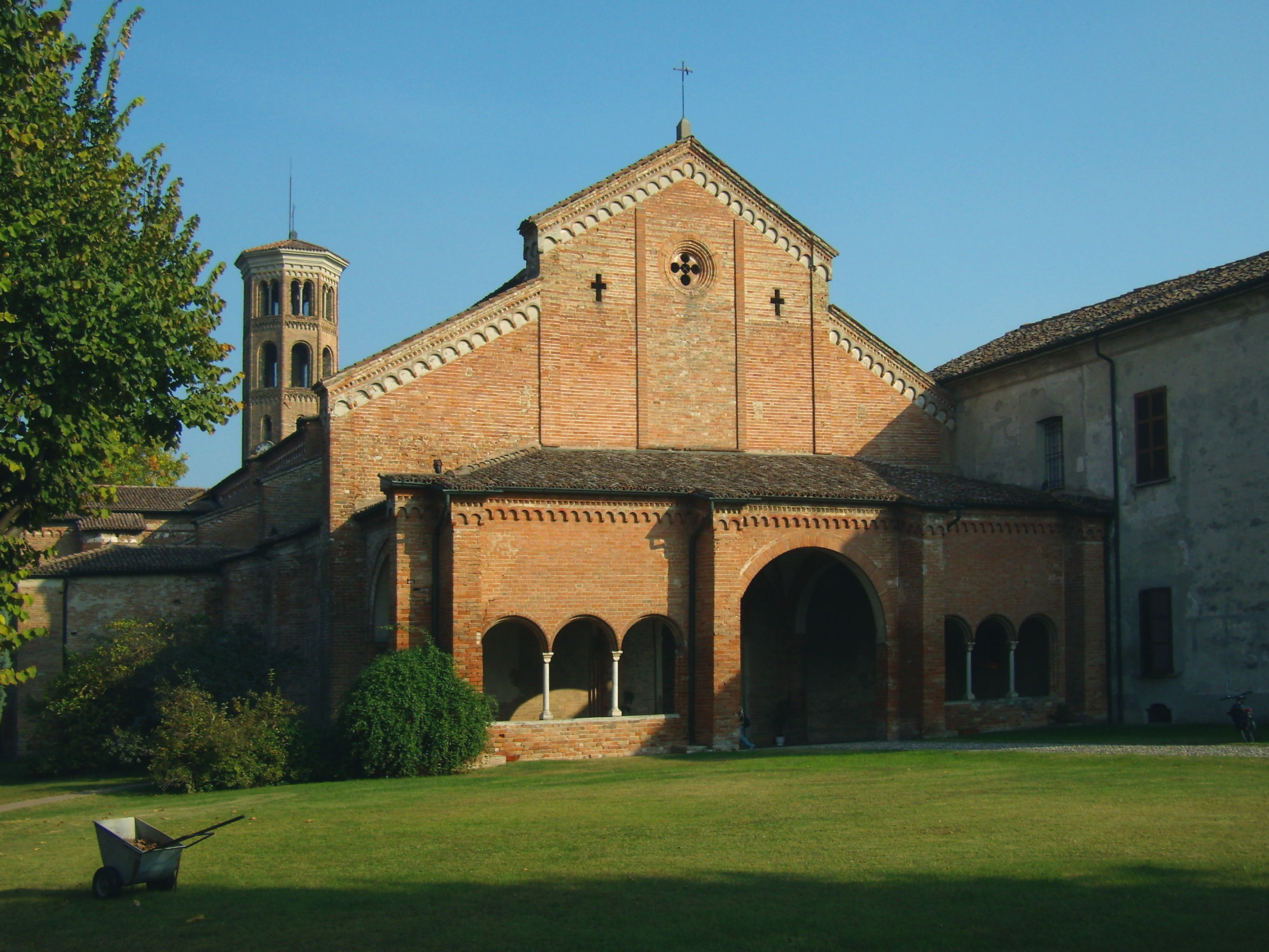 Abbadia Cerreto, la chiesa parrocchiale dell'Assunzione della Beata Vergine Maria.